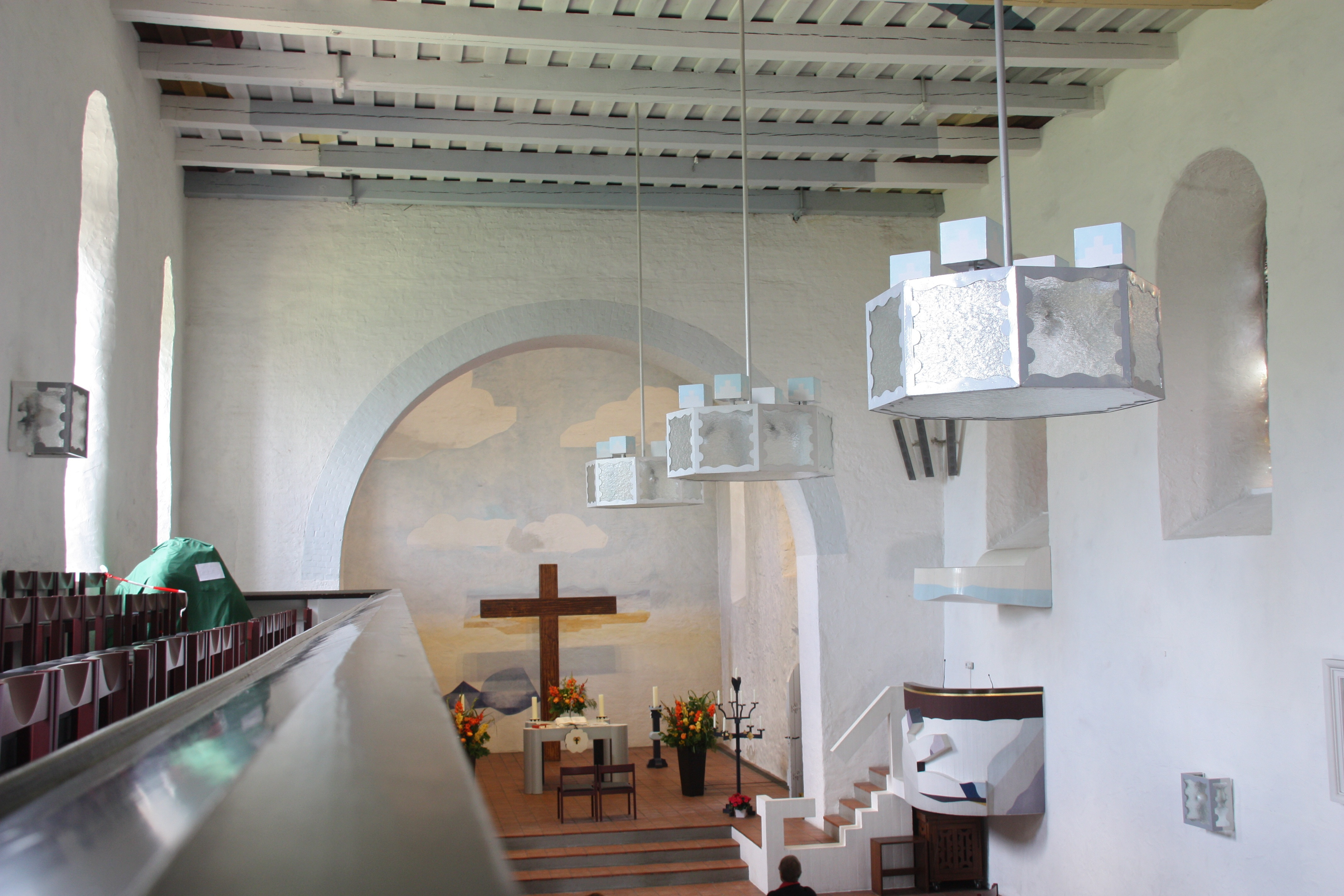 Kellinghusen, Kirche St. Cyriacus, Blick von der Empore